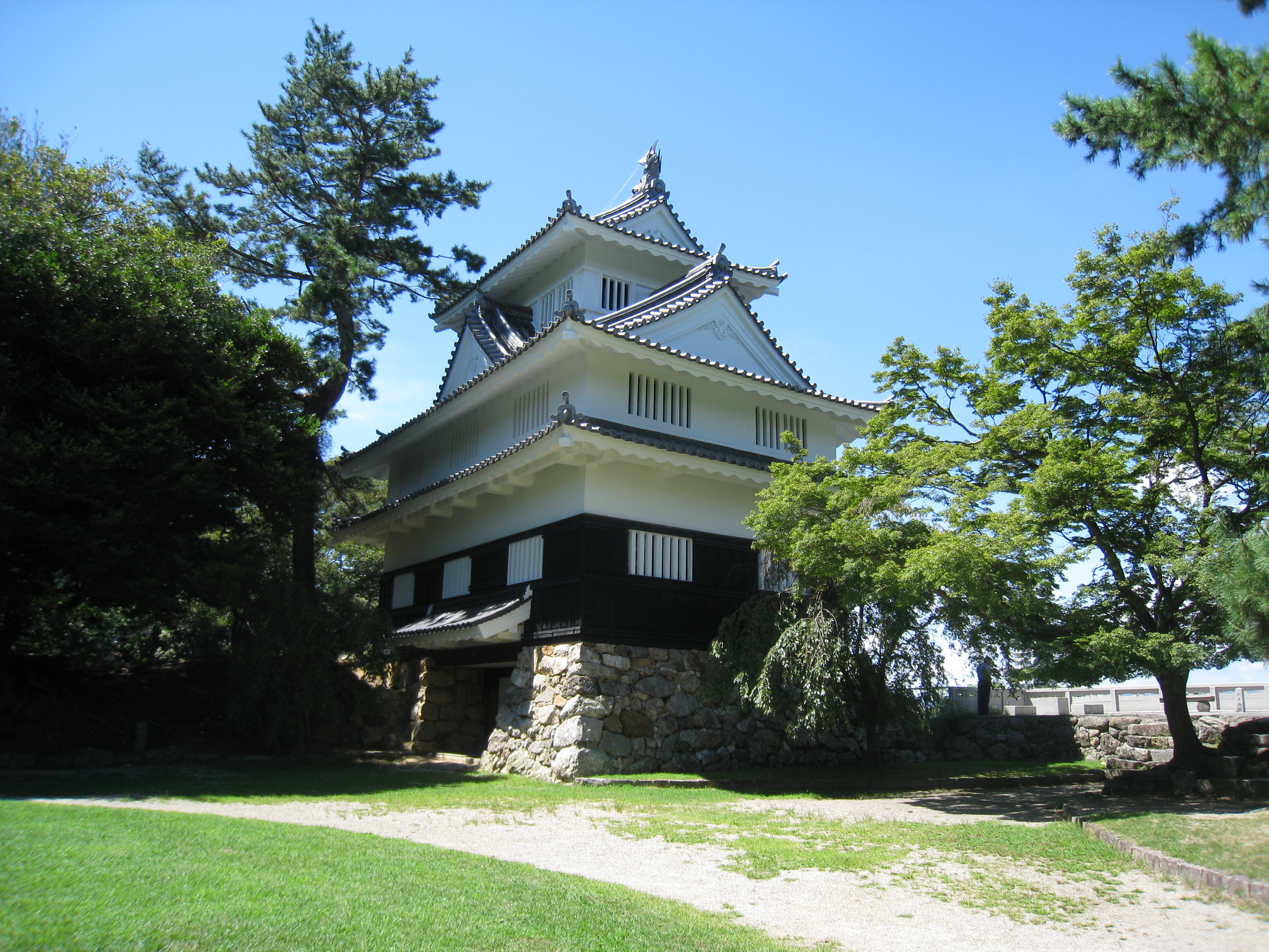 吉田城（三河）くろがね櫓